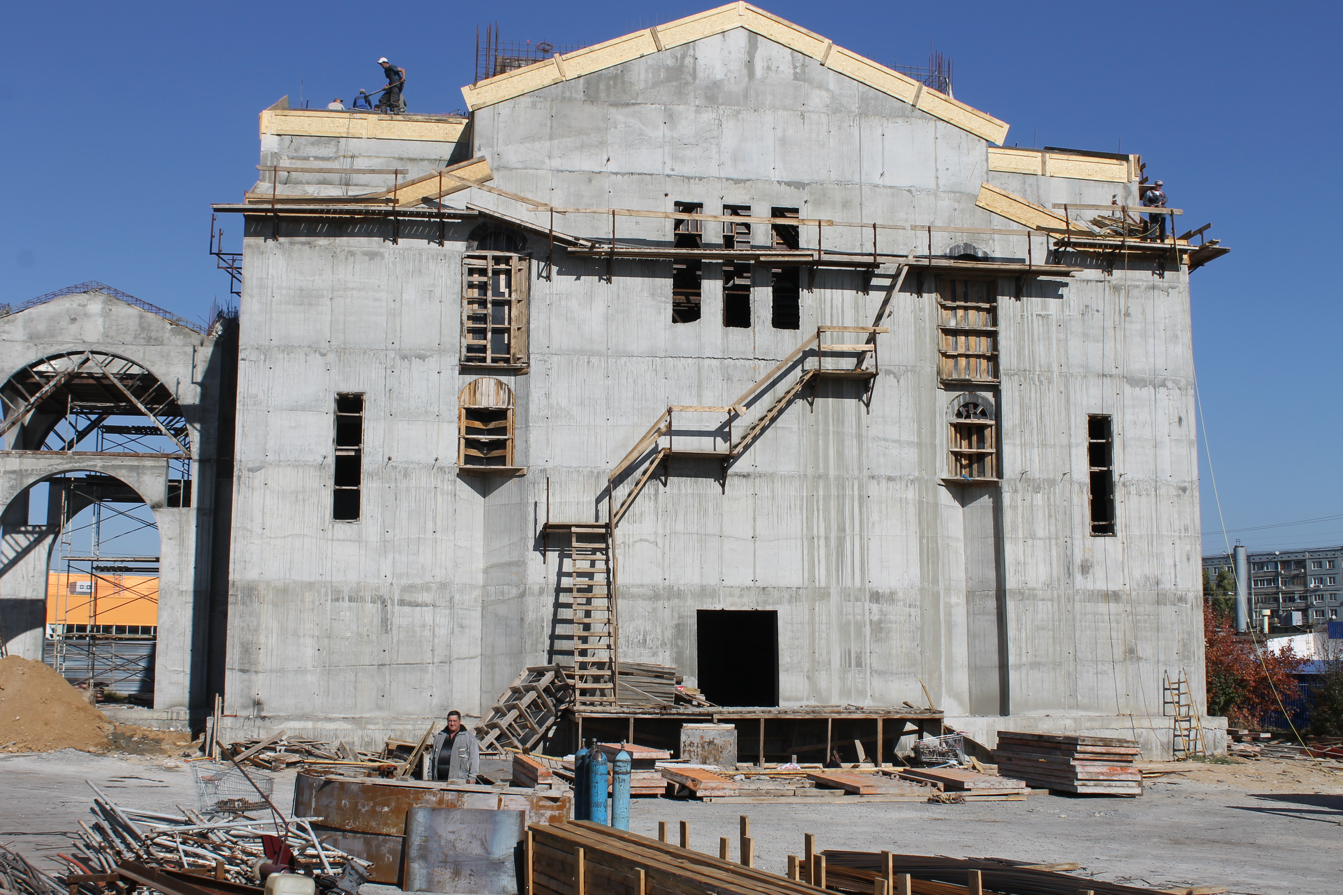 Строительство храма, октябрь 2014 г.